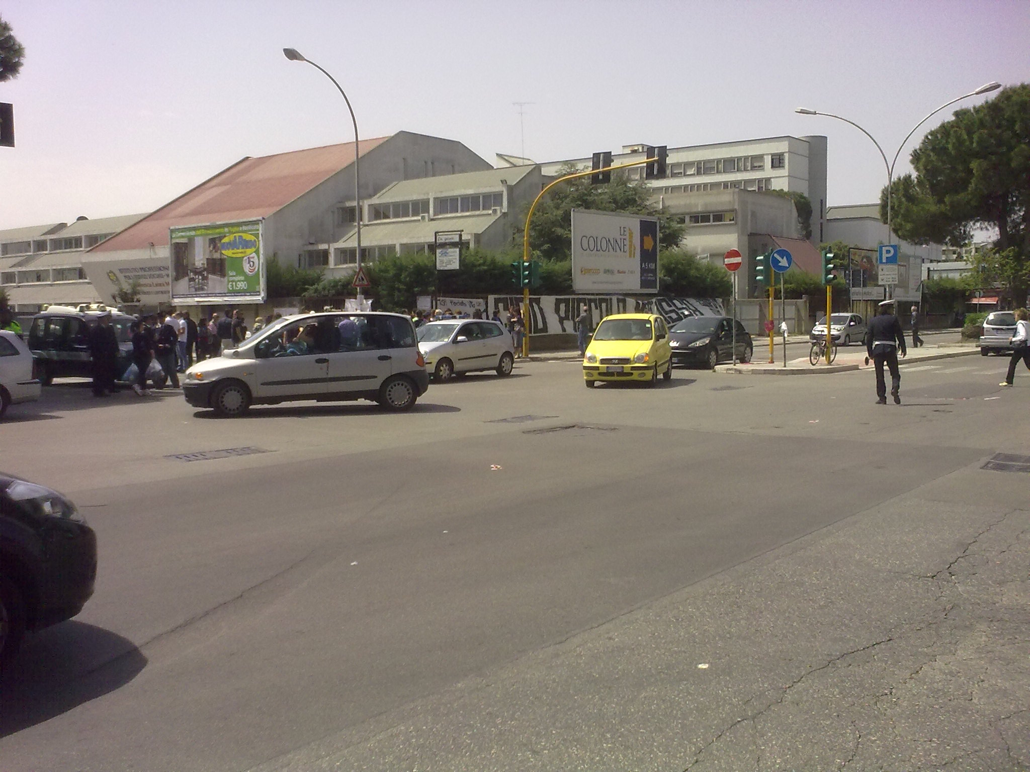 L'Istituto di moda "Morvillo-Falcone" il giorno dopo l'attentato.